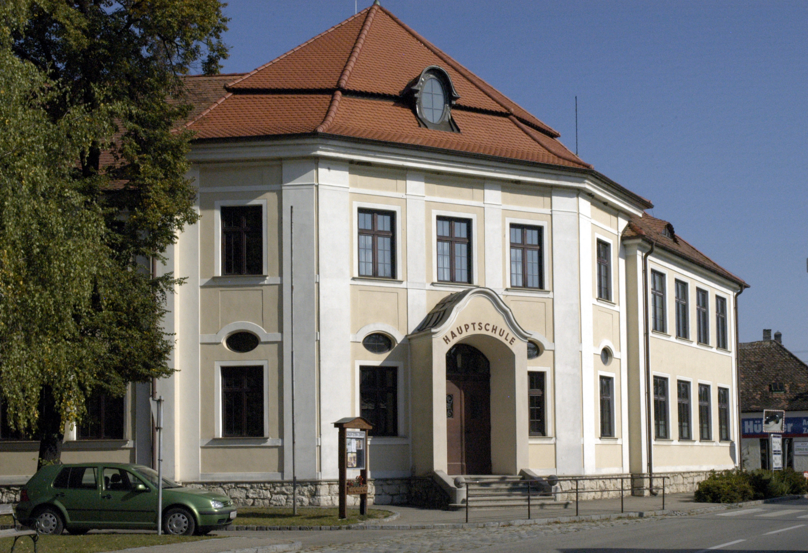 Hauptschule in Hadres